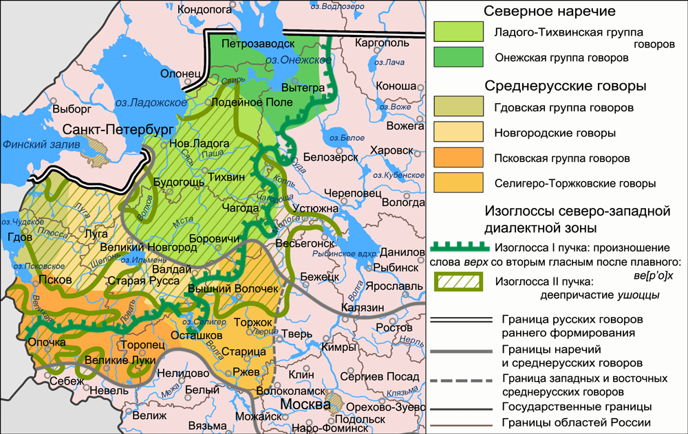 Карта говоров русского языка северо-западного региона (Онежская группа, Ладого-Тихвинская группа, Гдовская группа, Новгородские говоры, Псковская группа и Селигеро-Торжковские говоры) в ареале северо-западной диалектной зоны. На основе данных: Захарова К. Ф., Орлова В. Г. Диалектное членение русского языка. М.: Наука, 1970. 2-е изд.: М.: Едиториал УРСС, 2004 Русские. Монография Института этнологии и антропологии Федеральная целевая программа Русский язык. Региональный центр НИТ ПетрГУ